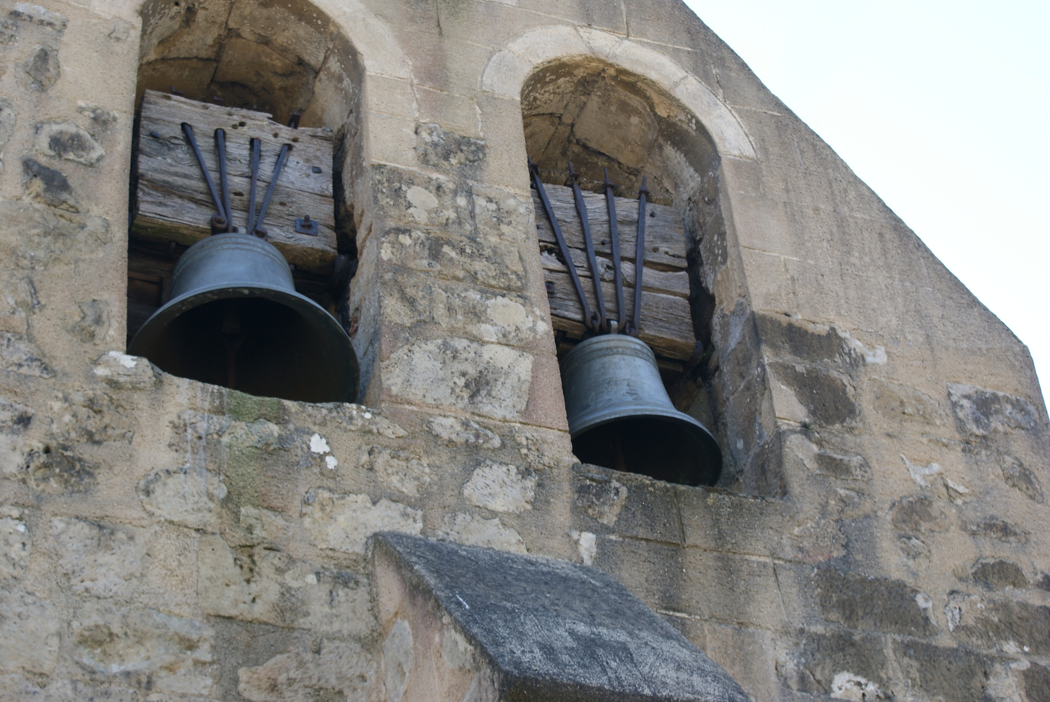 De klokkenmuur.